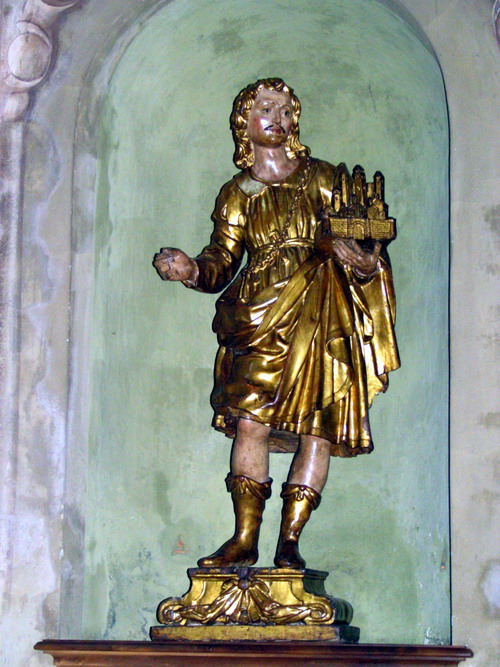 Asti, statua di San Secondo proveniente dalla Chiesa ex confraternita San Michele. Ora nella Collegiata di Asti